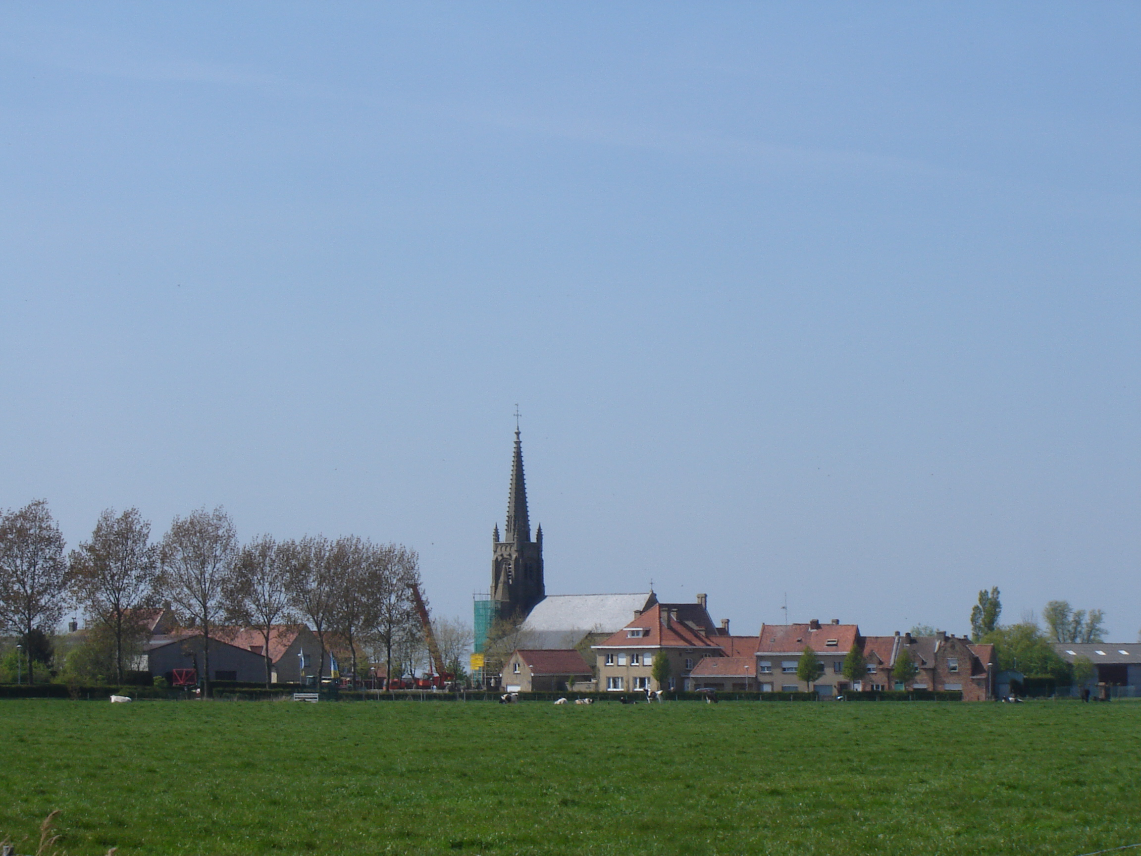 Uitzicht op Stuivekenskerke View on Stuivekenskerke, Diksmuide, West Flanders, Belgium